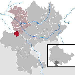 Dingsleben in Thuringia - district Hildburghausen